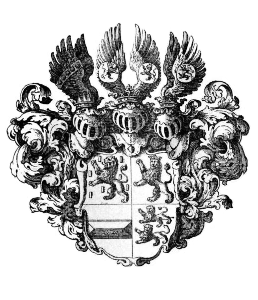 Wappen der Grafen von Nassau, Grafen zu Katzenelnbogen, Vianden und Diez (ottonische Linien Nassau-Dillenburg, Nassau-Hadamar, Nassau-Diez, Nassau-Siegen und Nassau-Katzenelnbogen): Schild geviert: Feld 1: Grafen von Nassau, Feld 2: Grafen von Katzenelnbogen, Feld 3: Grafschaft Vianden, Feld 4: Grafen von Diez; gültig 1559—1739 ([1])